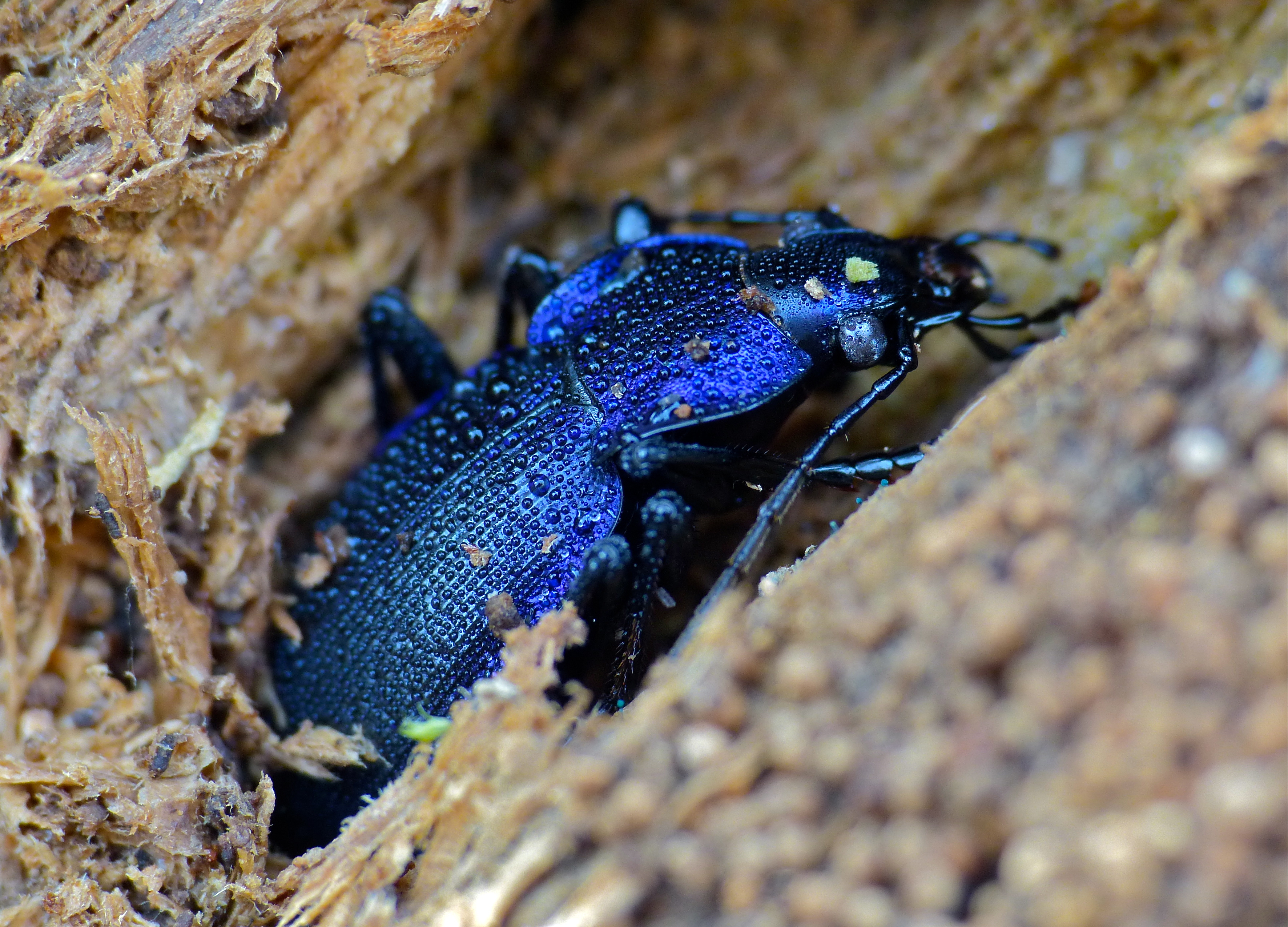 Forêt d' Ecouves, Orne, FRANCE